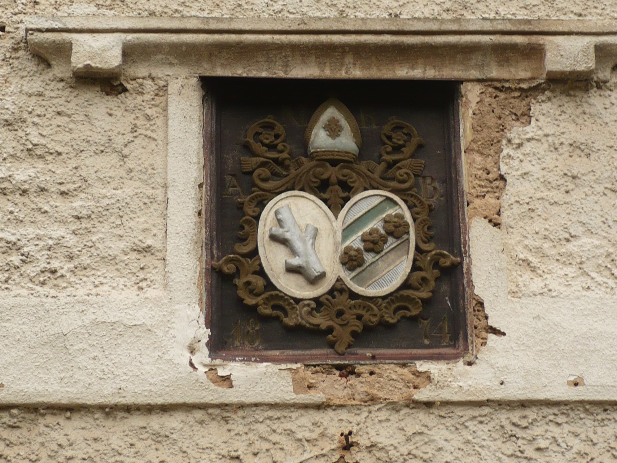 Ruprechtice. kartusz z herbem Jana Nepomucena Rottera (1807-1886) - opata klasztoru benedyktynów w Broumovie